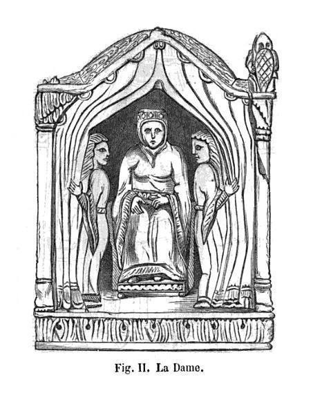 Darstellung der Königin / Echecs de Charlemagne